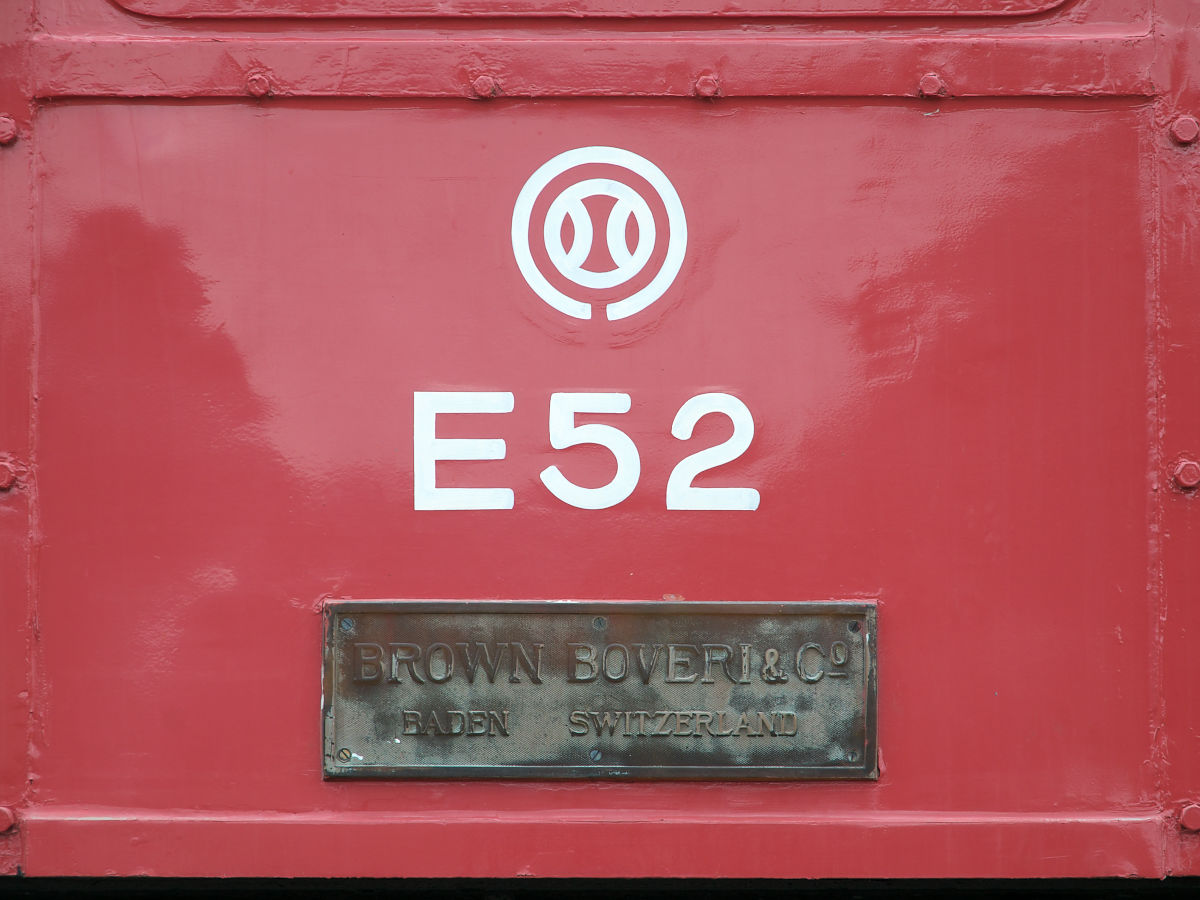 西武鉄道E51形電気機関車（E52）、Brown Boveriの製造銘板。横瀬車両基地の保存車。